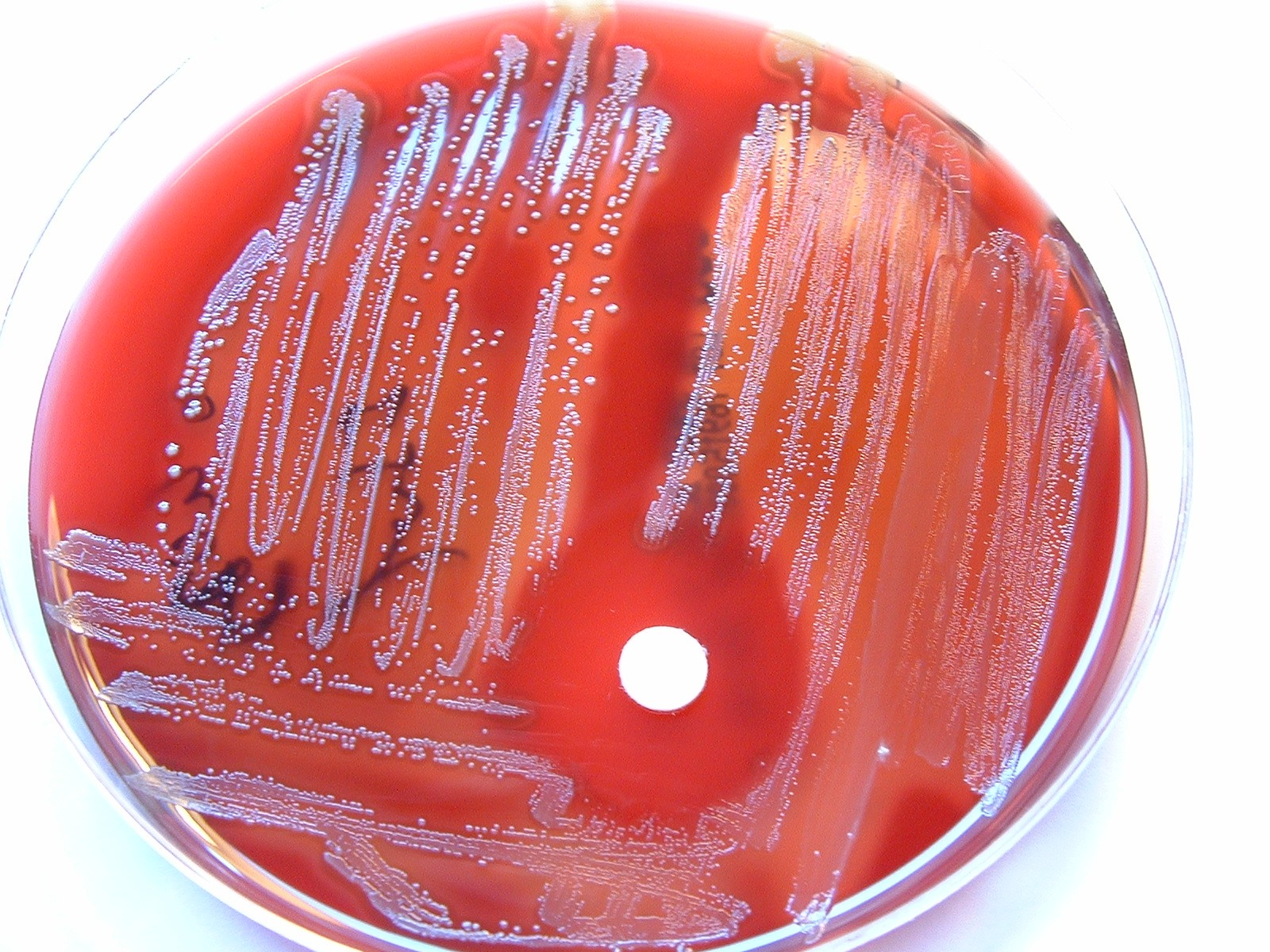 Test à la bacitracine sur une souche de Streptococcus pyogenes (image personnelle) Philippinjl 8 novembre 2005